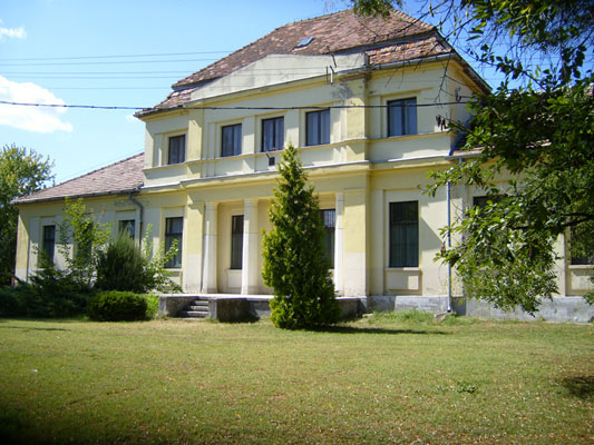 Báró Fould-Springer kastélya.